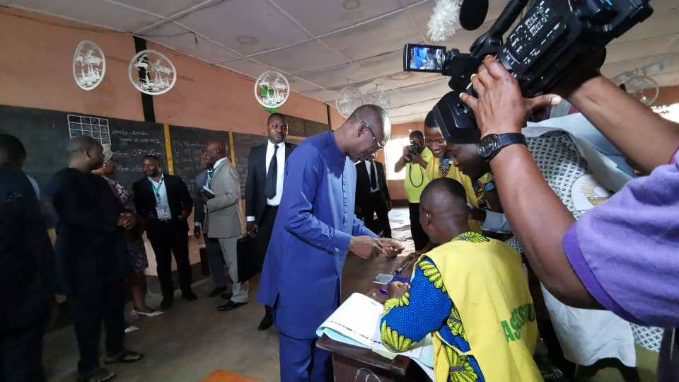 Patrice Talon dans un bureau de vote, à Cotonou, Bénin, le 29 avril 2019. (VOA/Ginette Fleure Adandé)